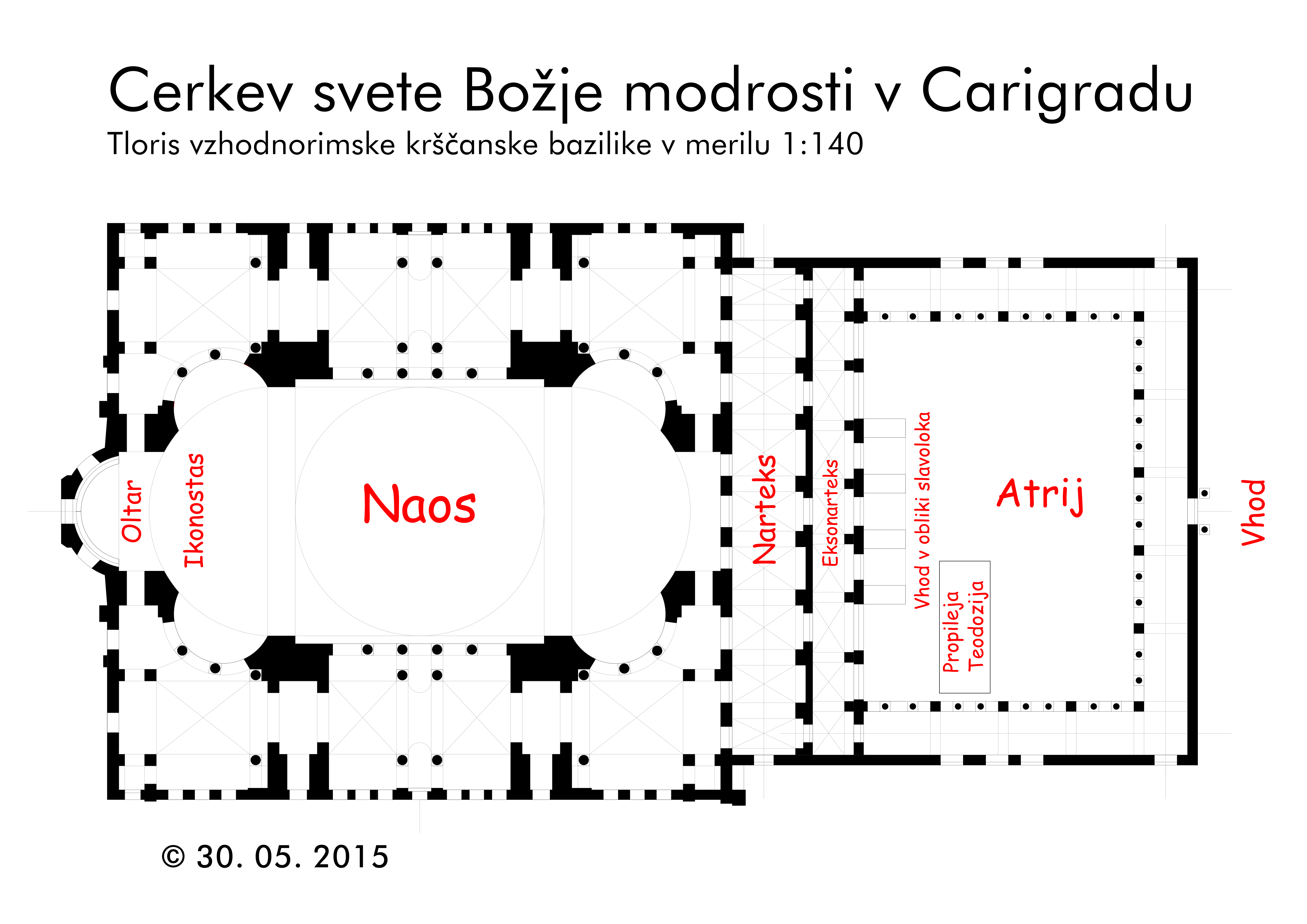 hagija Sofija tloris v slovenščini